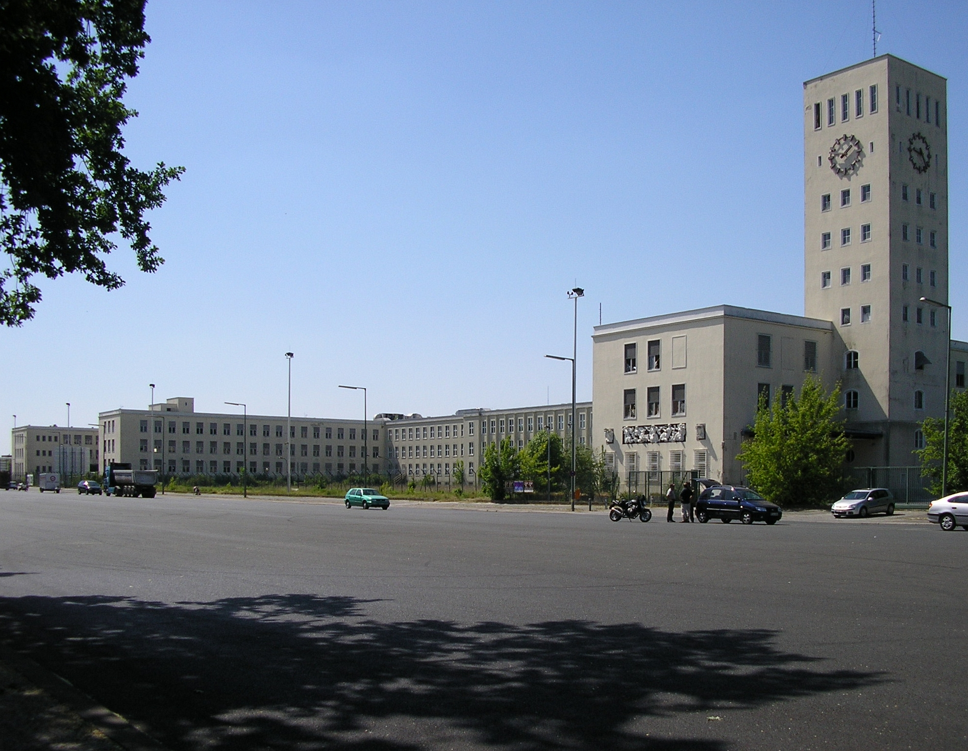 Ehemaliges Telefunken-Werk Berlin-Lichterfelde(Goerzallee)